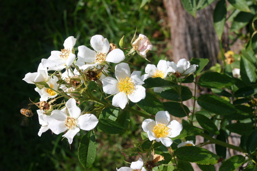 Single musk rose (R. moschata) Rosa moschata